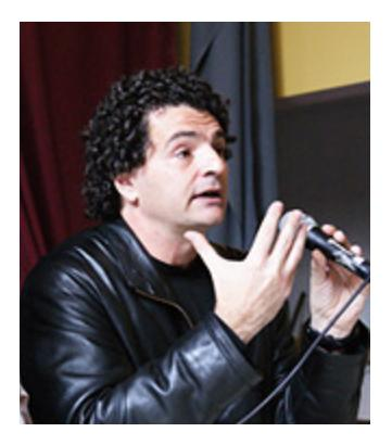 «El historiador Sergio Wischñevsky en la escuela Julio Cortázar», artículo del 16 de septiembre de 2014 en el Boletín Digital Educación y Memoria, n.º 77 (Buenos Aires). Conmemoración de los 35 años de la Noche de los Lápices (1976).